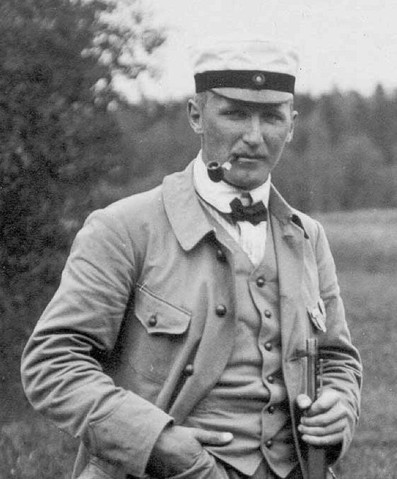 Åke Lundeberg (14 December 1888 – 29 May 1939)